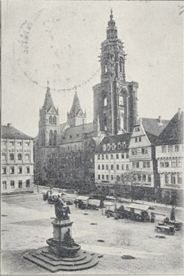 Kaiserstraße 30-34 und Kilianskirche in Heilbronn